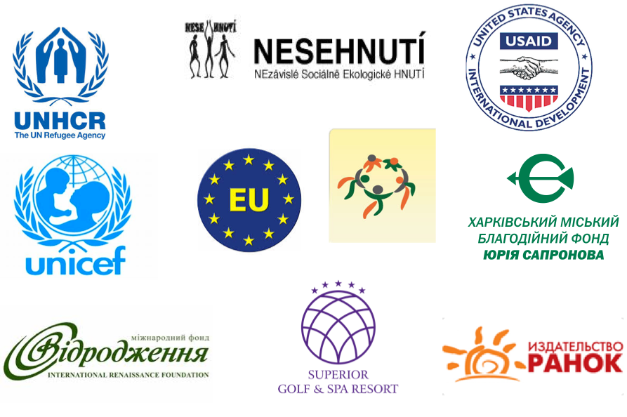 «Станція Харків»: донори і благодійнки